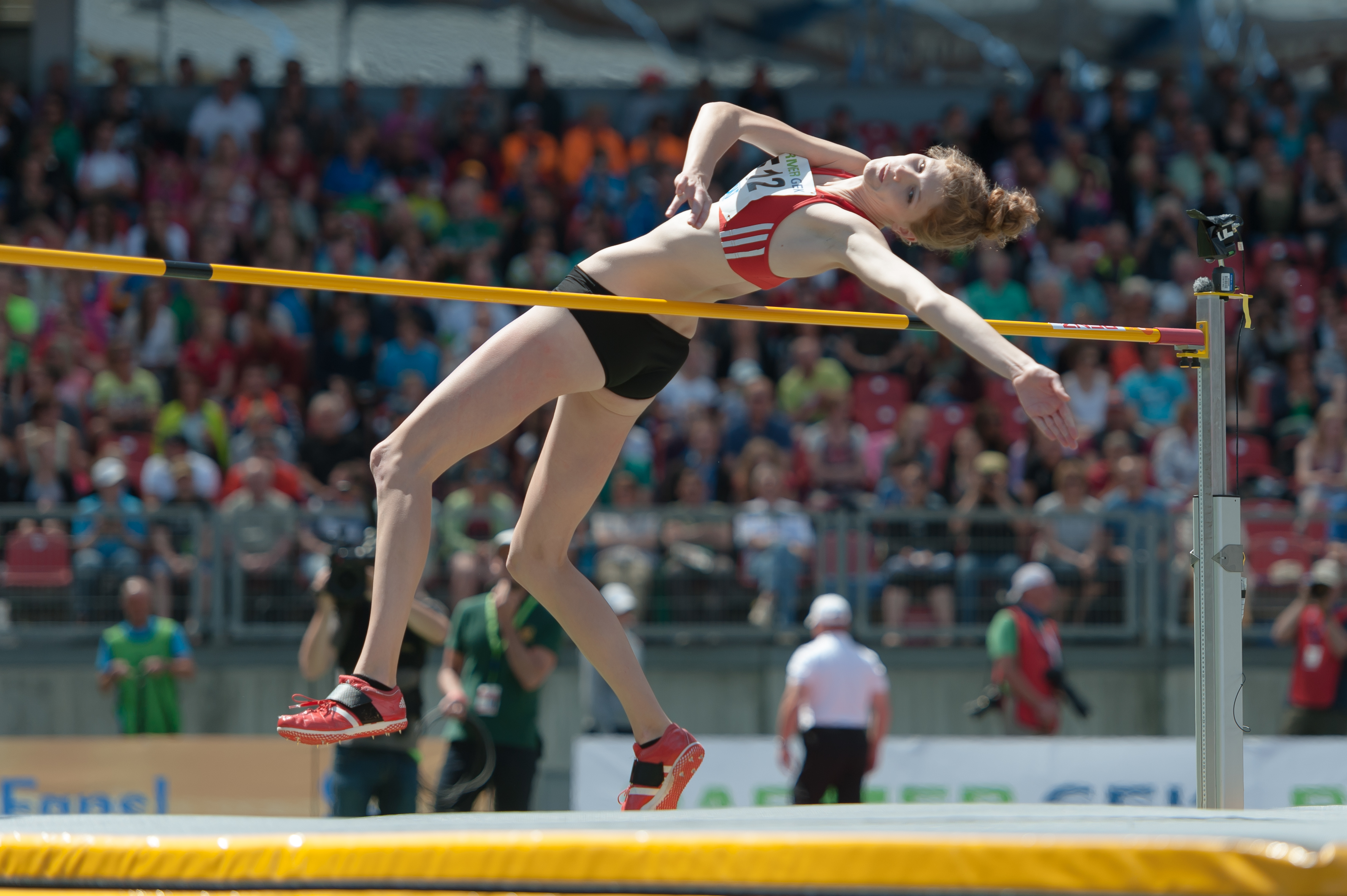 Deutsche Leichtathletik-Meisterschaften 2015: Frauen Hochsprung - Imke Onnen, LG Hannover